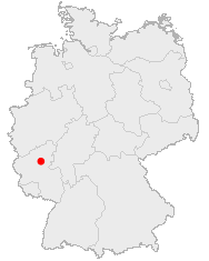 Löf op der Däitschlandkaart